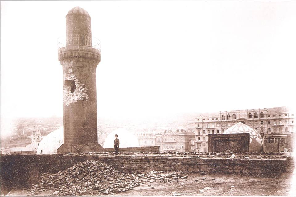 Şah məscidi 1918-ci il 31 mart hadisələrindən sonra